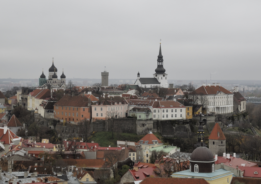 Toompea